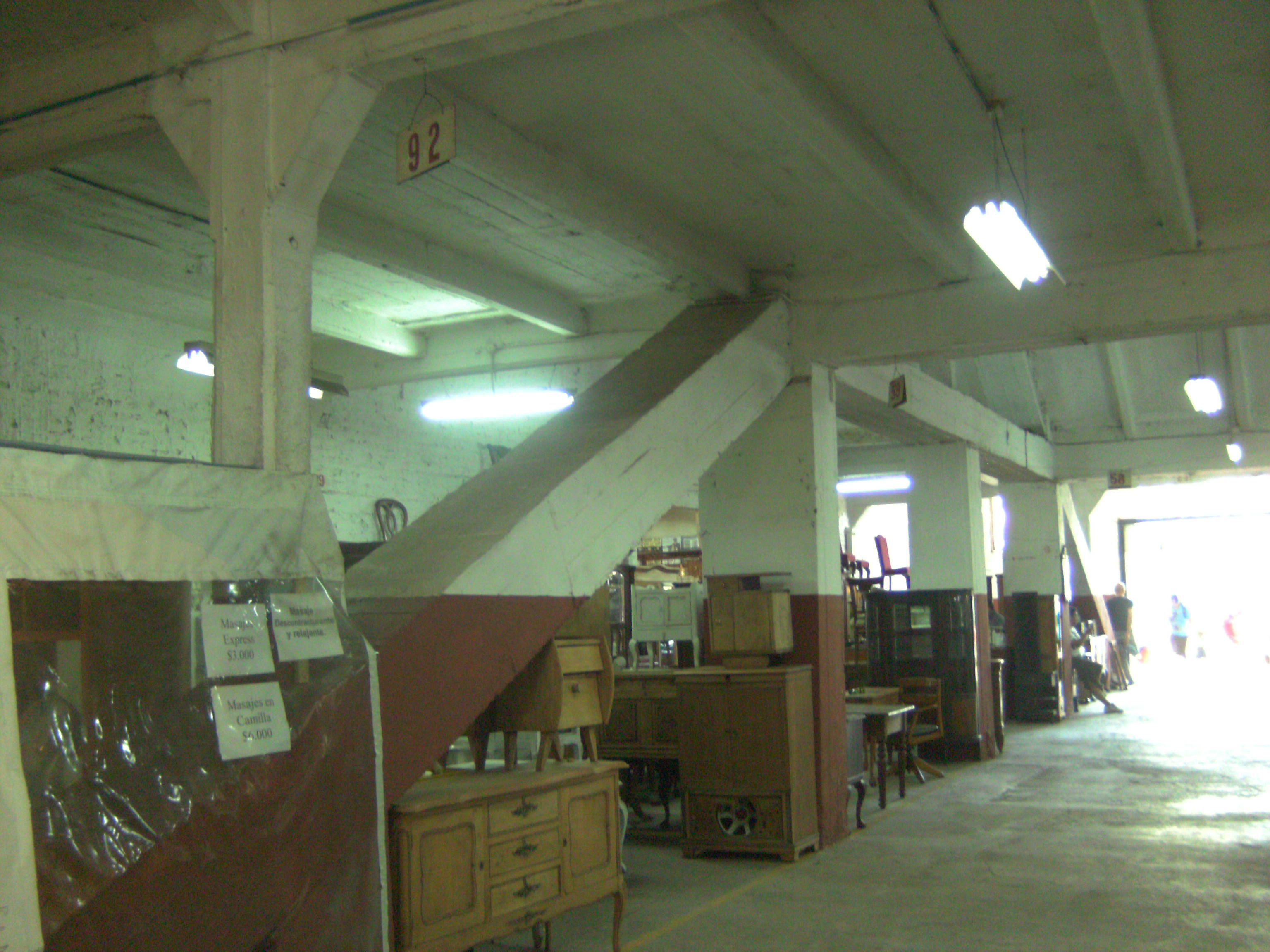 Antiguo galpón industrial transformado en la feria persa Biobío.